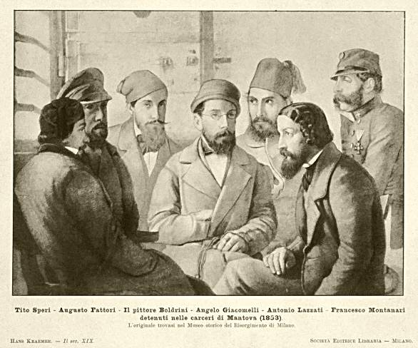 "Tito Speri, Augusto Fattori, il pittore Giuseppe Boldrini, Angelo Giacomelli, Antonio Lazzati, Francesco Montanari nelle carceri di Mantova nel 1853", ridotto e ritoccato, litografia. L'originale è al Museo del Risorgimento a Milano.